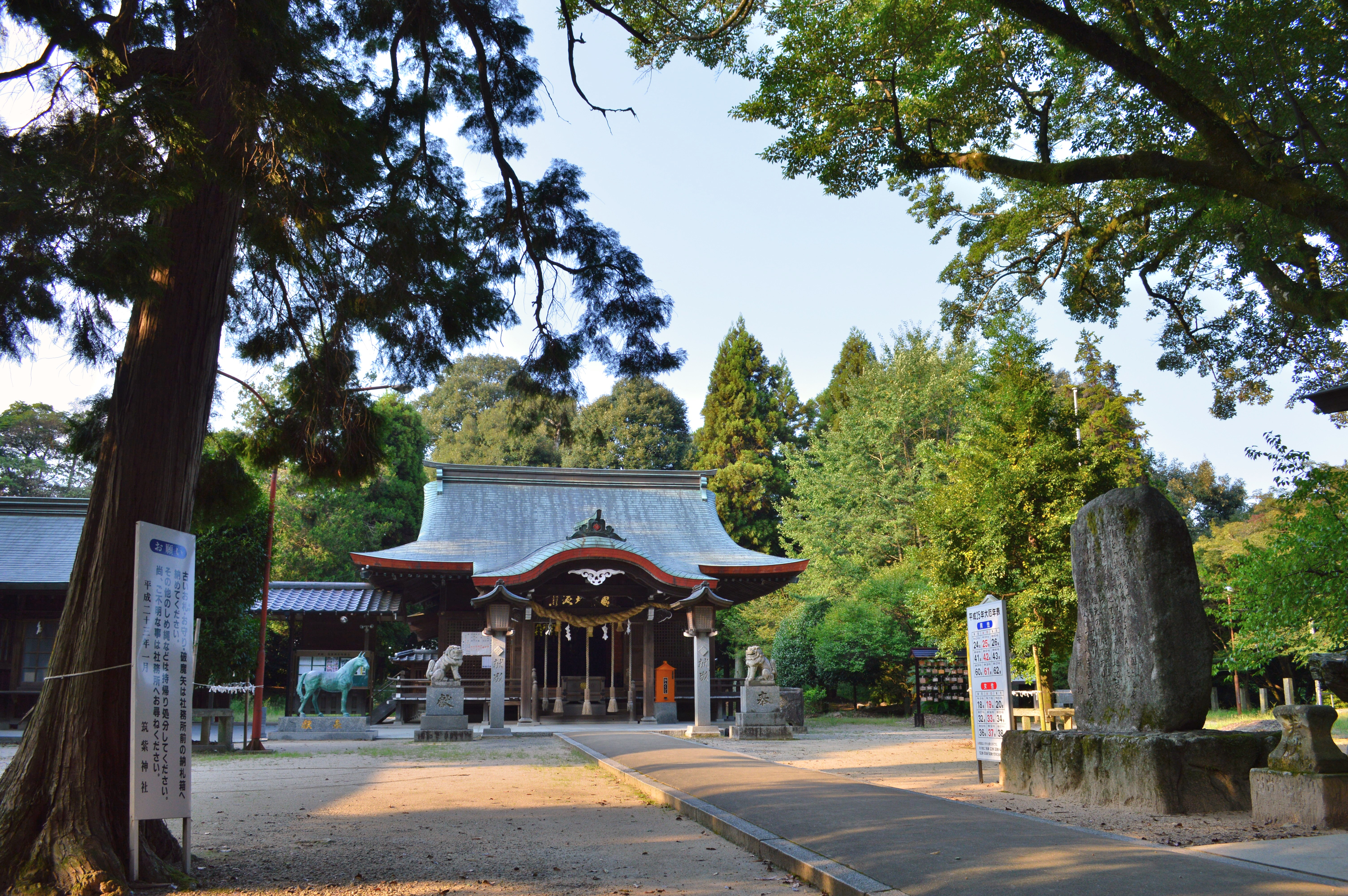 筑紫神社 境内